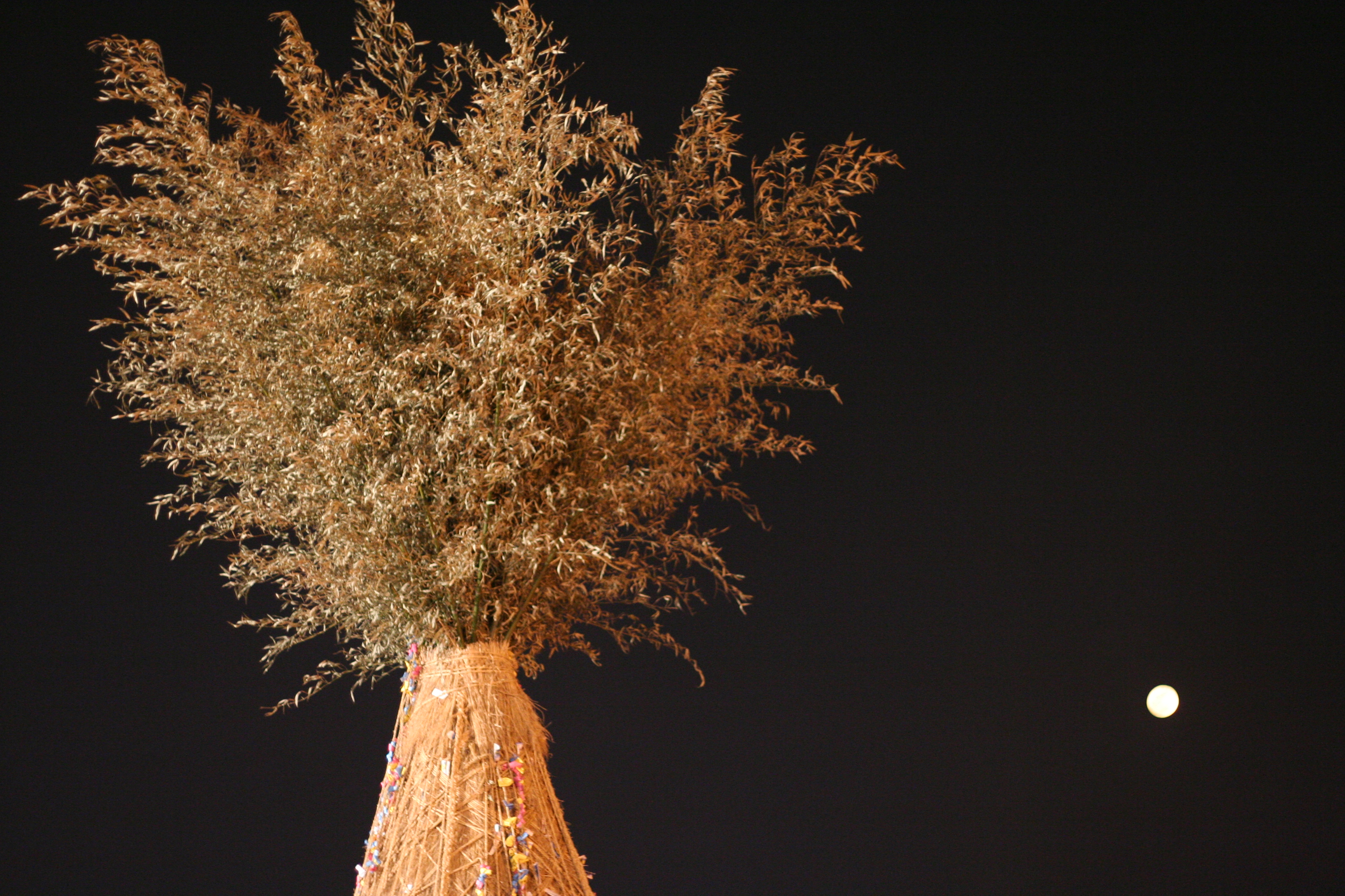 Korea-Daeboreumnal (Full Moon Festival)